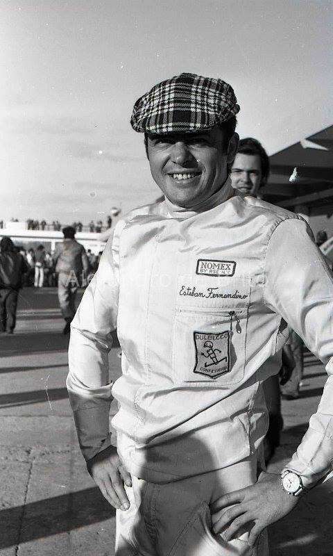 Esteban Fernandino II, F2MA 1973.